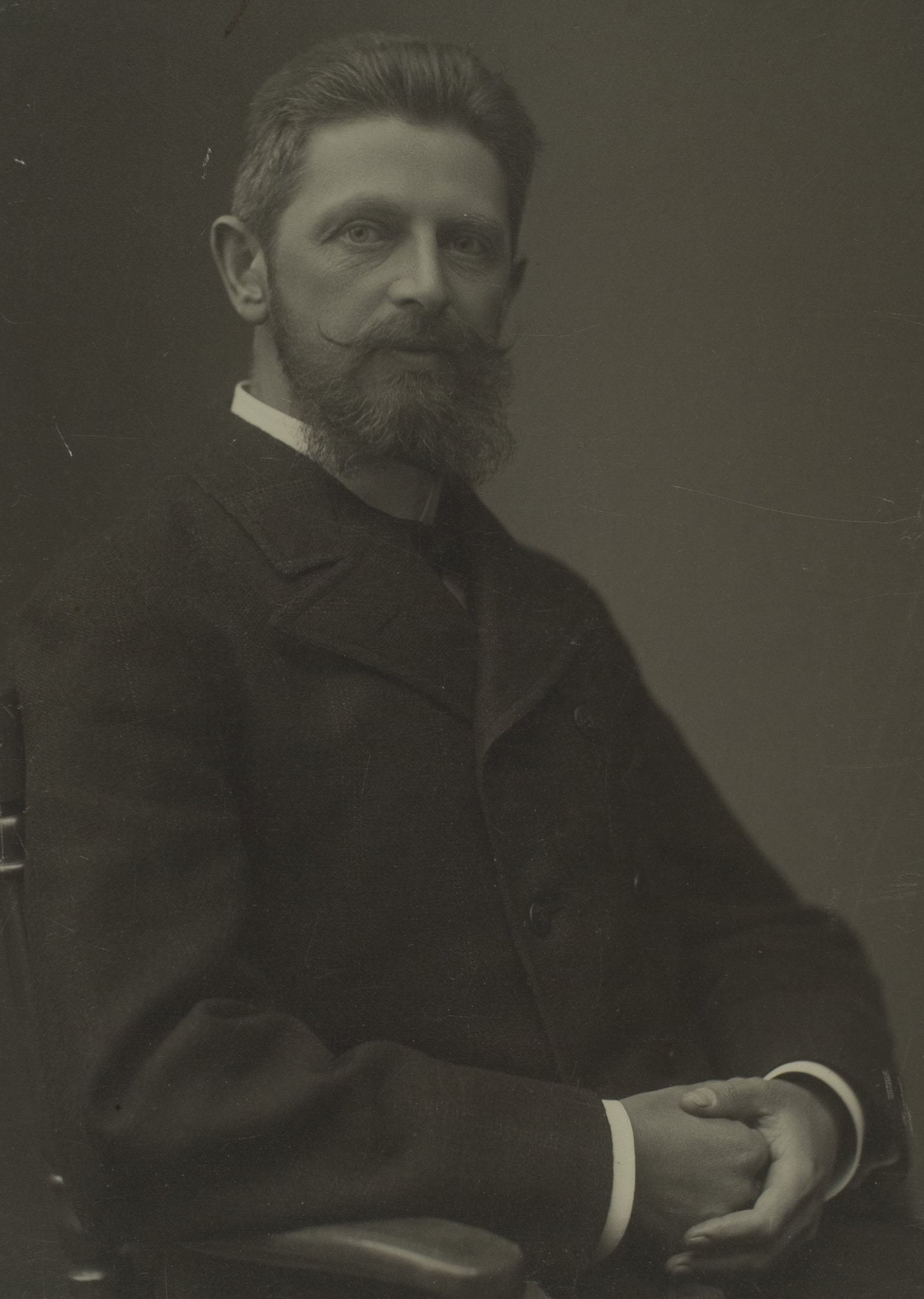 Wilhelm Hermann Salomon-Calvi, Geologe und Mineraloge, 1899–1934 Professor in Heidelberg